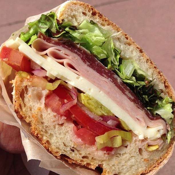 Italian Salumi (coppa and mortadella)